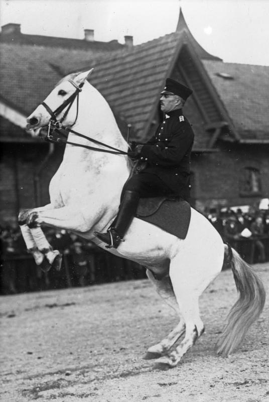 Hohe Schule der bayerischen Landespolizei! Ein Oberwachtmeister der berittenen Landespolizei führt auf seinem Schimmel die Hohe Schule vor.